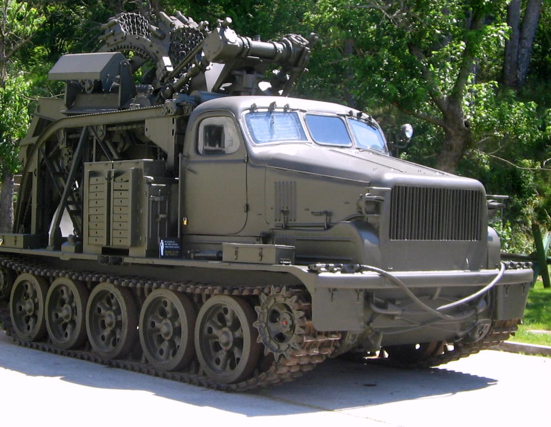 Park of Military History, Pivka, Slovenija